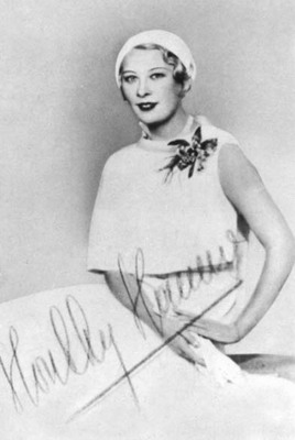 Honthy Hanna